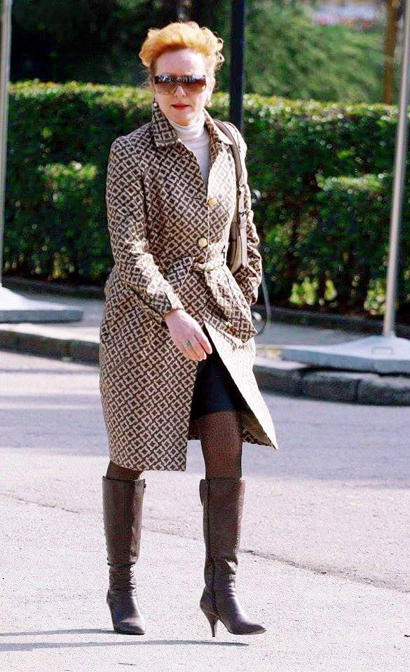 Pernaska para seances parlamentare, 2010